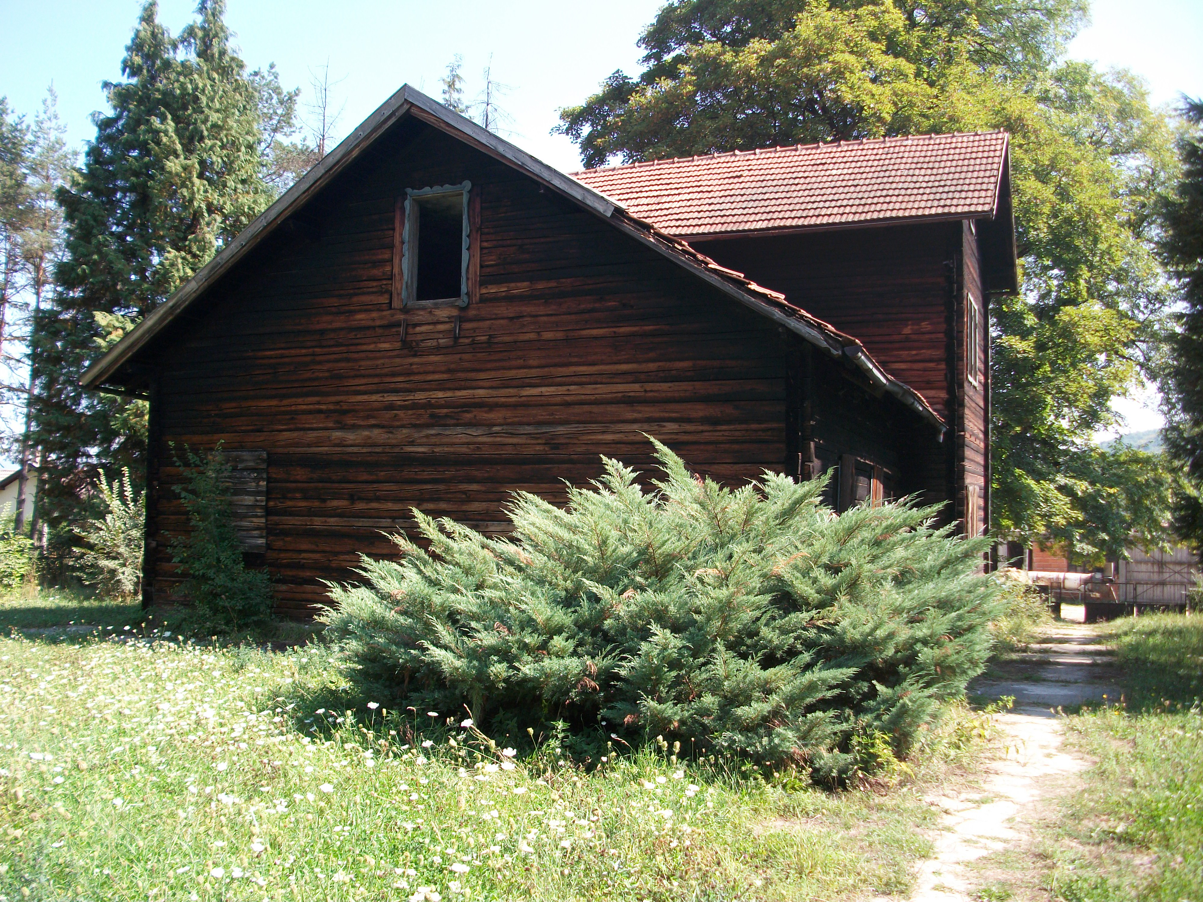 Spomenik u bivšem koncentracionom logoru Kruščica u Vitezu, Bosna i Hercegovina